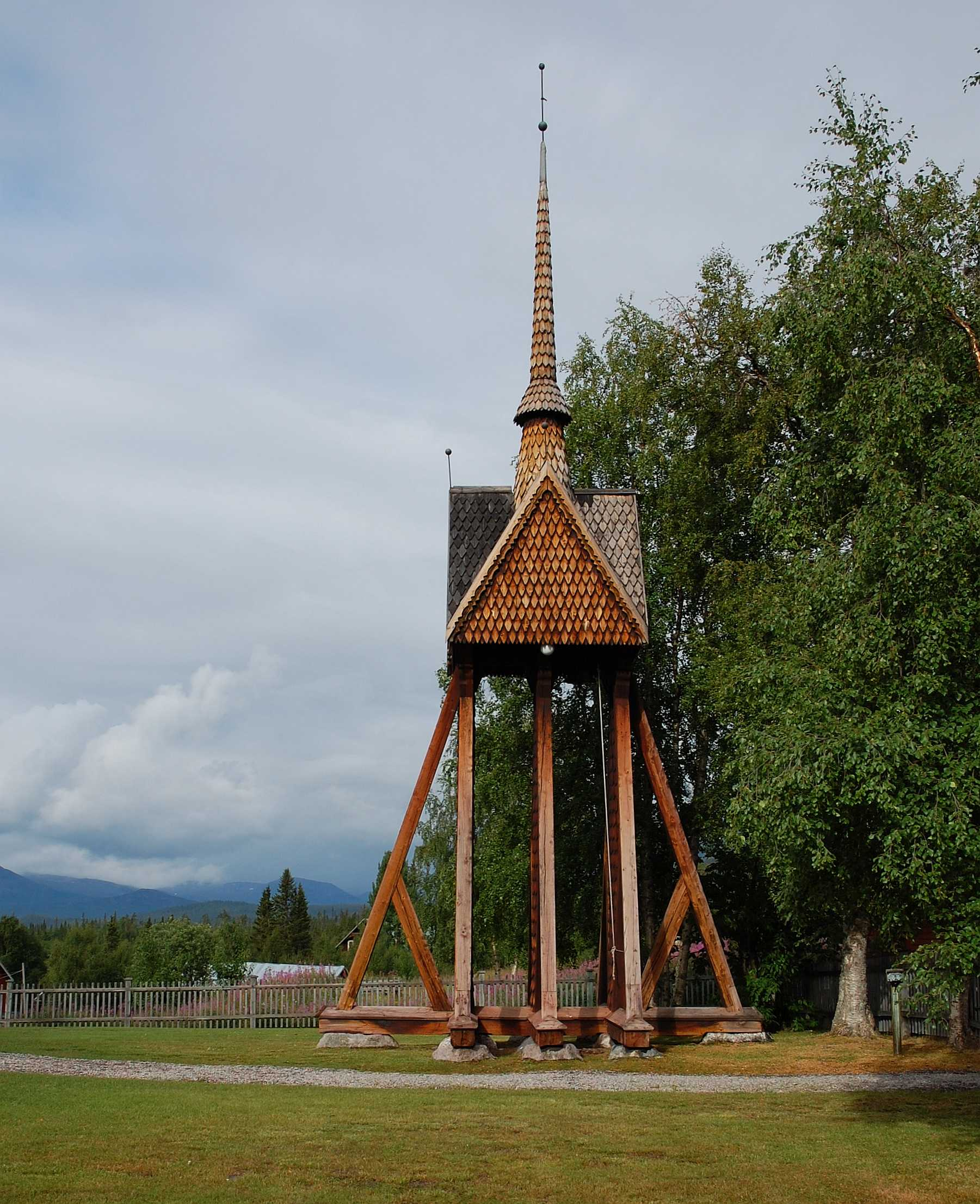 Kvikkjokks kyrkas klockstapel